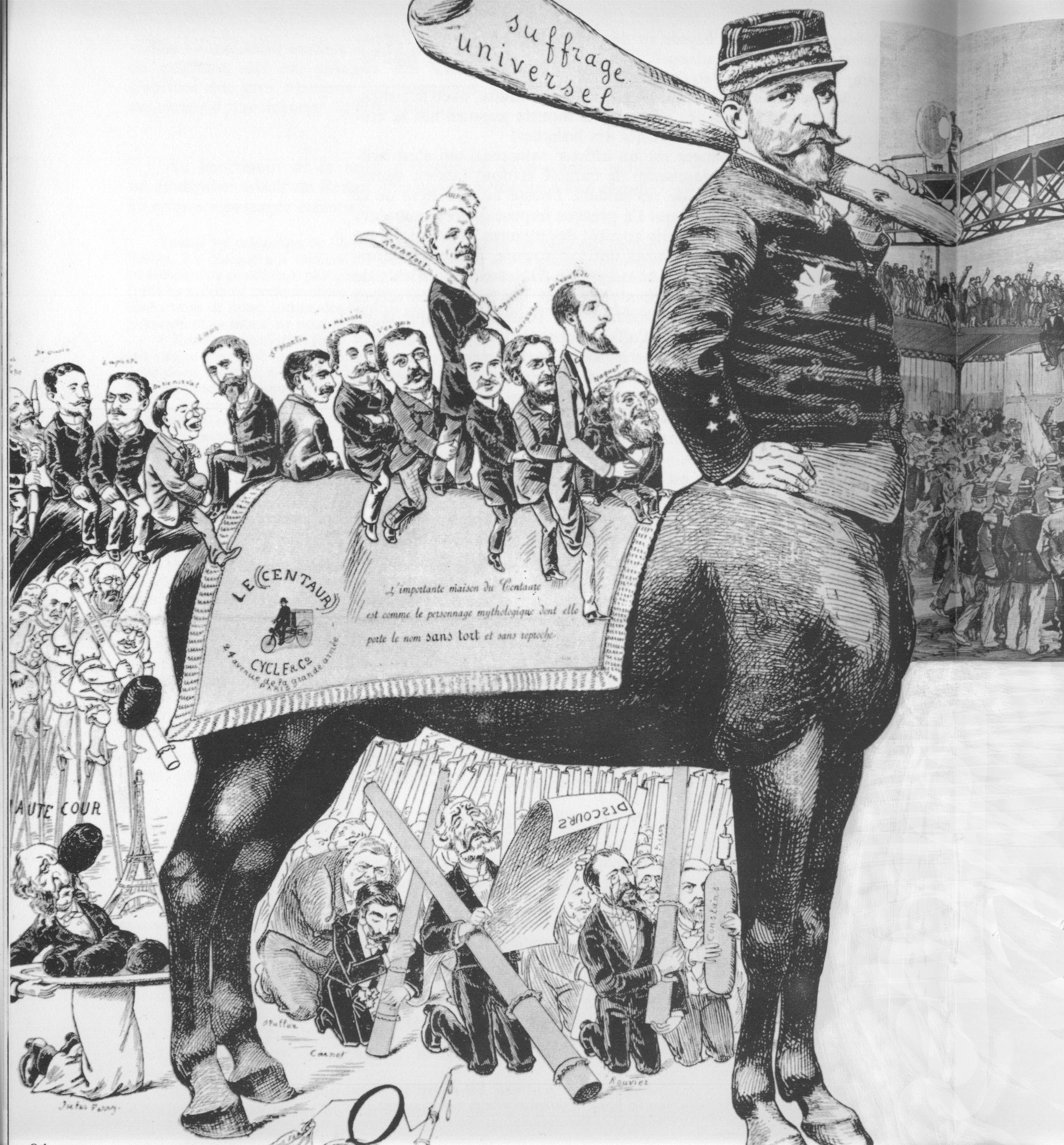 dessin humoristique du général Boulanger faisant référence à son habitude de parader à cheval et a son image trop parfaite.